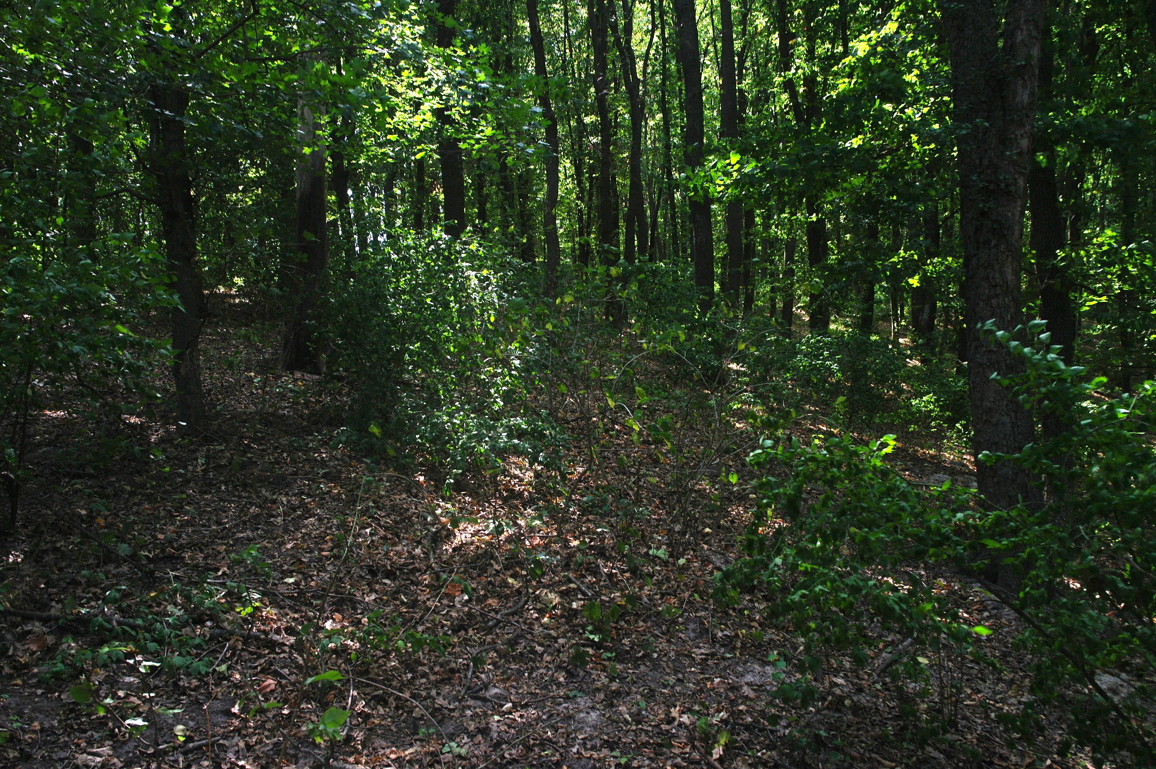 заросле молодим лісом Шарапівське городище. Місце вказав голова с.Пастирське